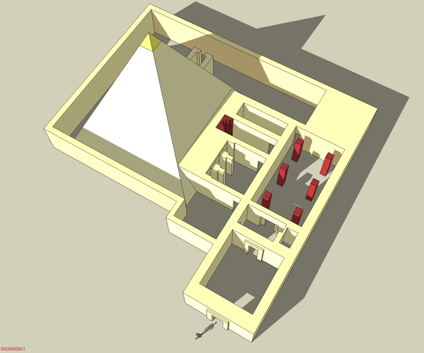 Autre proposition d'élévation de la pyramide de la reine Ipout Ire, épouse de Téti - Saqqarah - VIe dynastie égyptienne